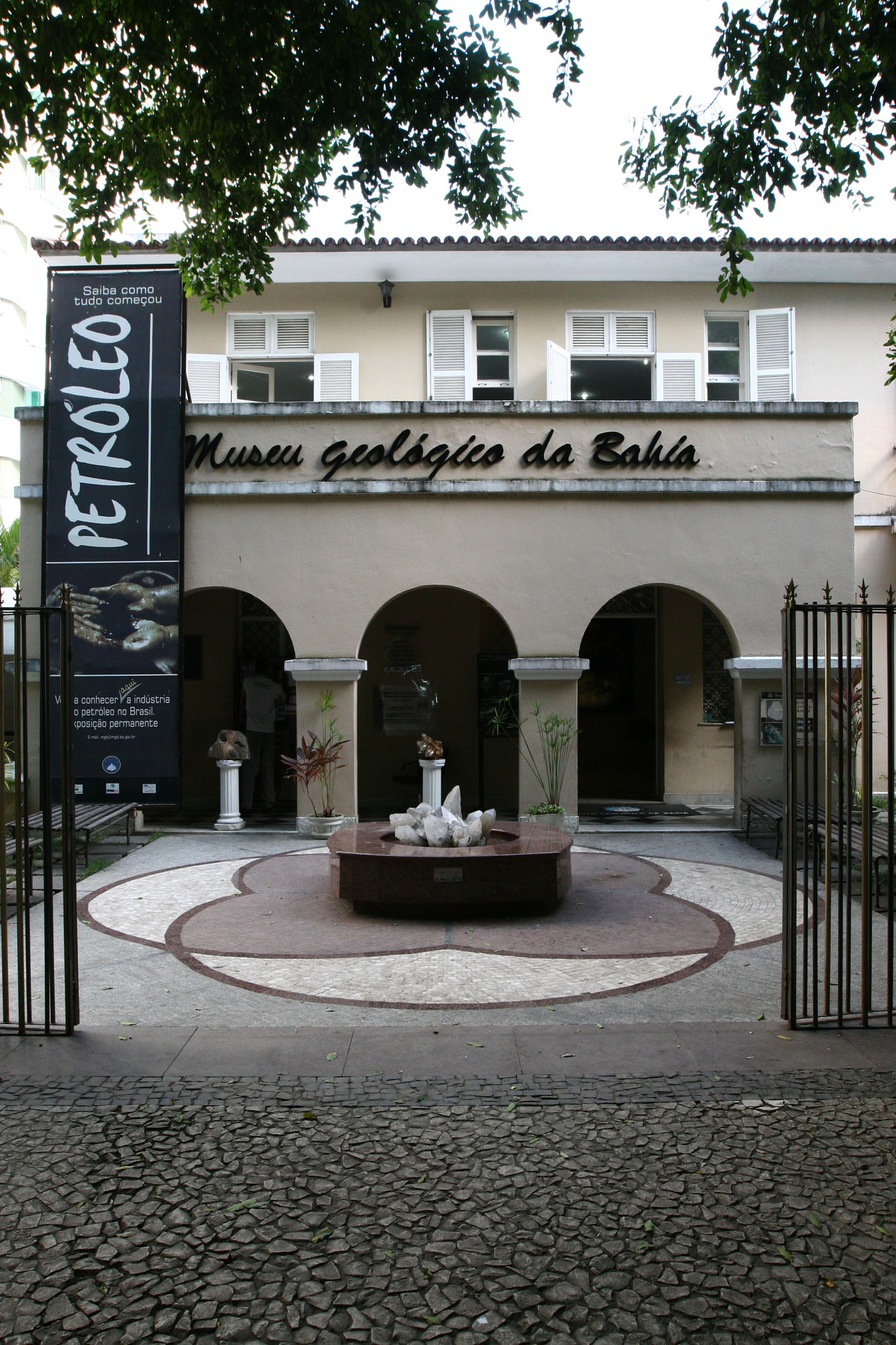 Divulgação do decreto de redução do ICMS para o setor de Jóias e Gemas Na foto: Fachada do Museu Geológico da Bahia Foto: Rafael Martins/AGECOM